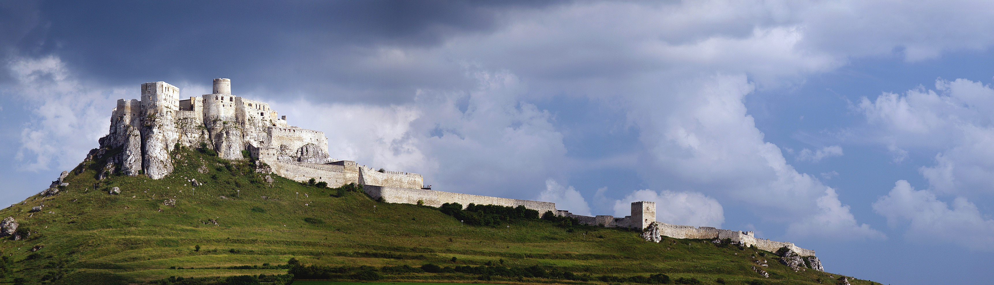 Spisske Podhradie - Château de Spiš